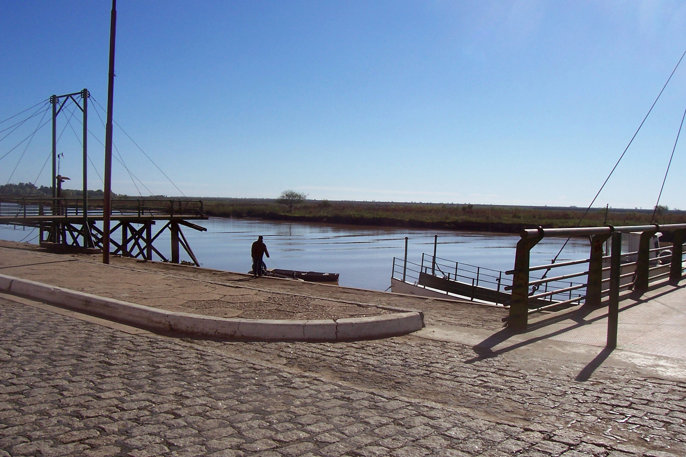 El río Baradero, visto desde la ciudad homónima.